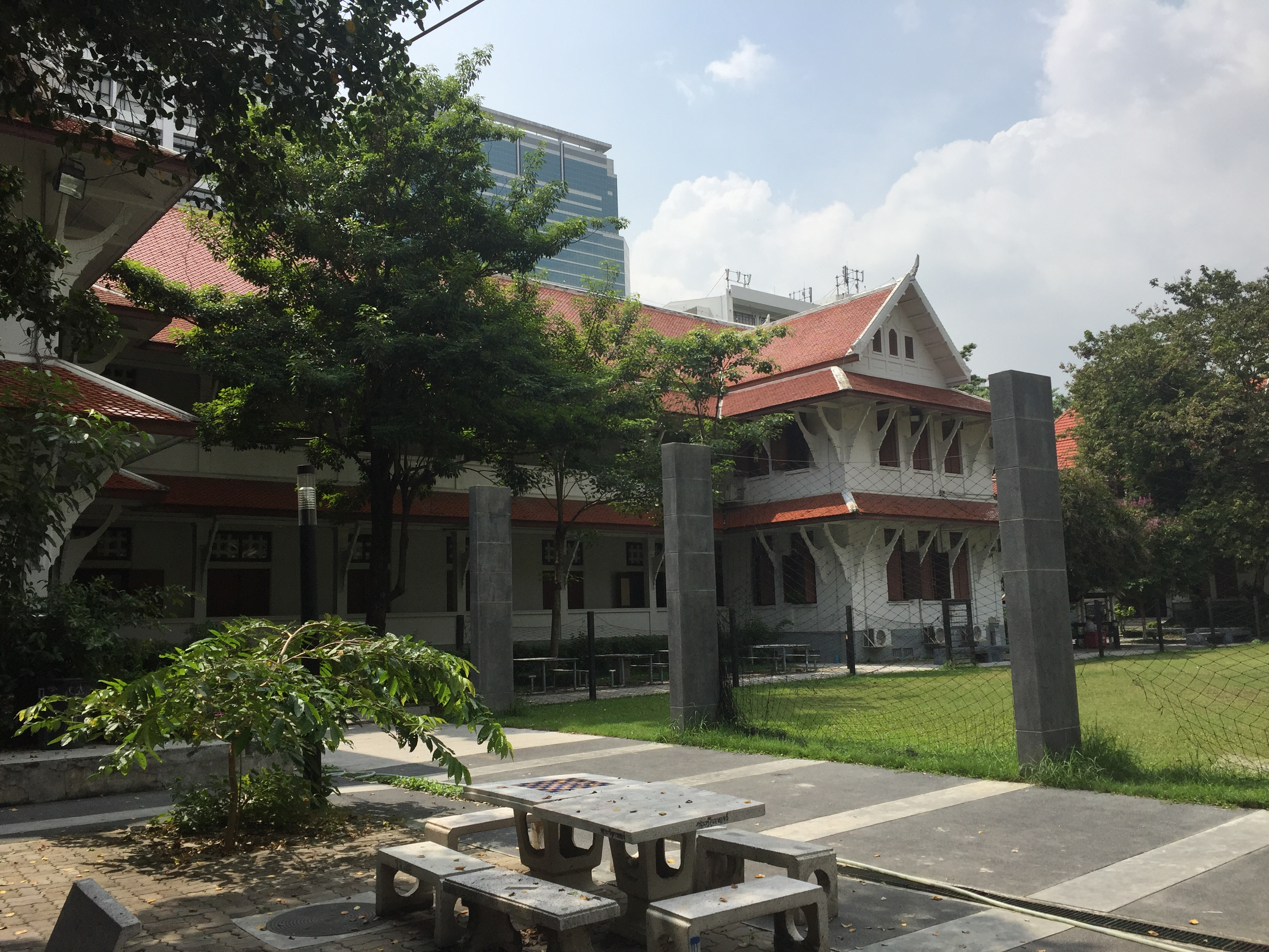 สนามฟุตบอลคณะรัฐศาสตร์